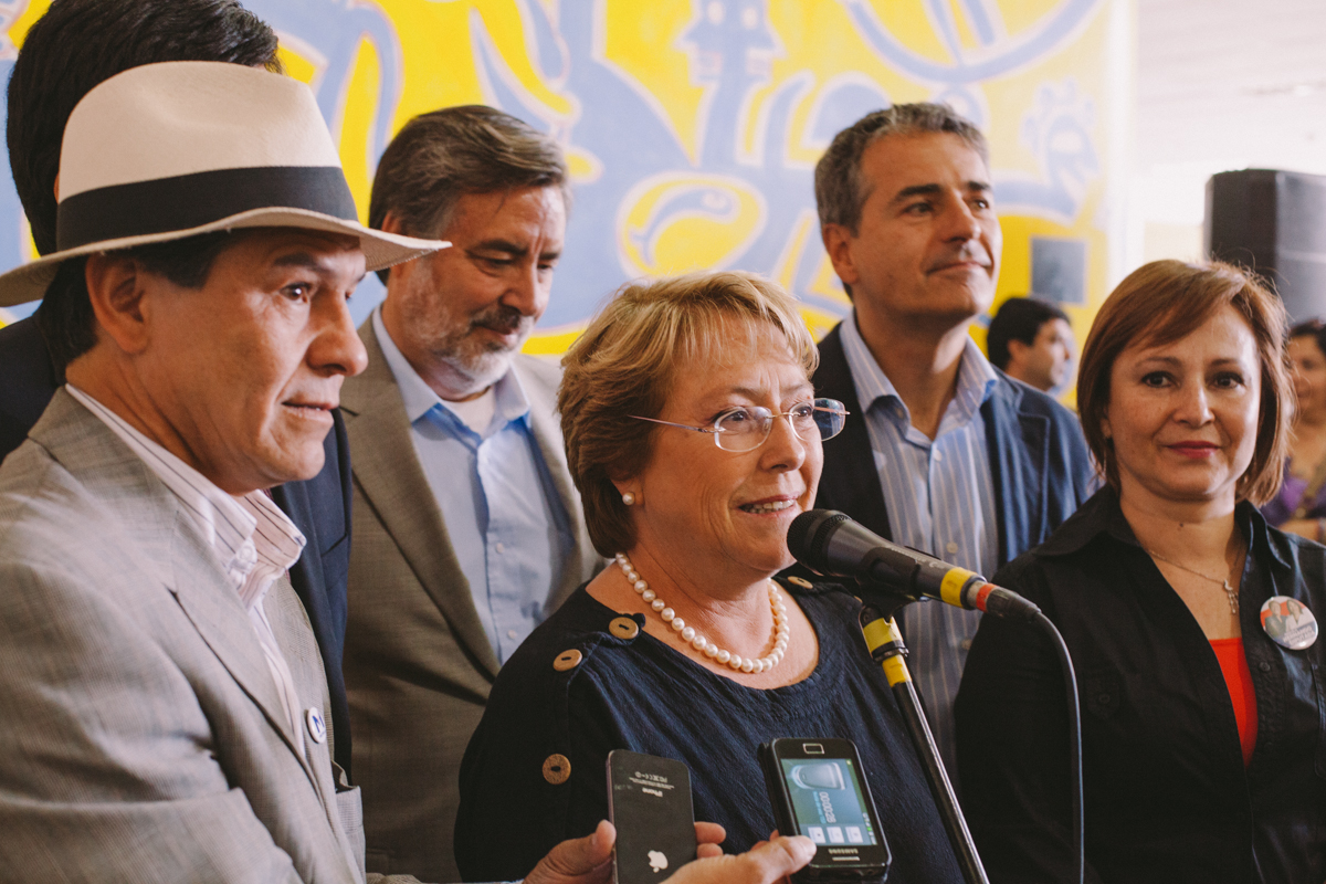 Antofagasta 09/11/2013